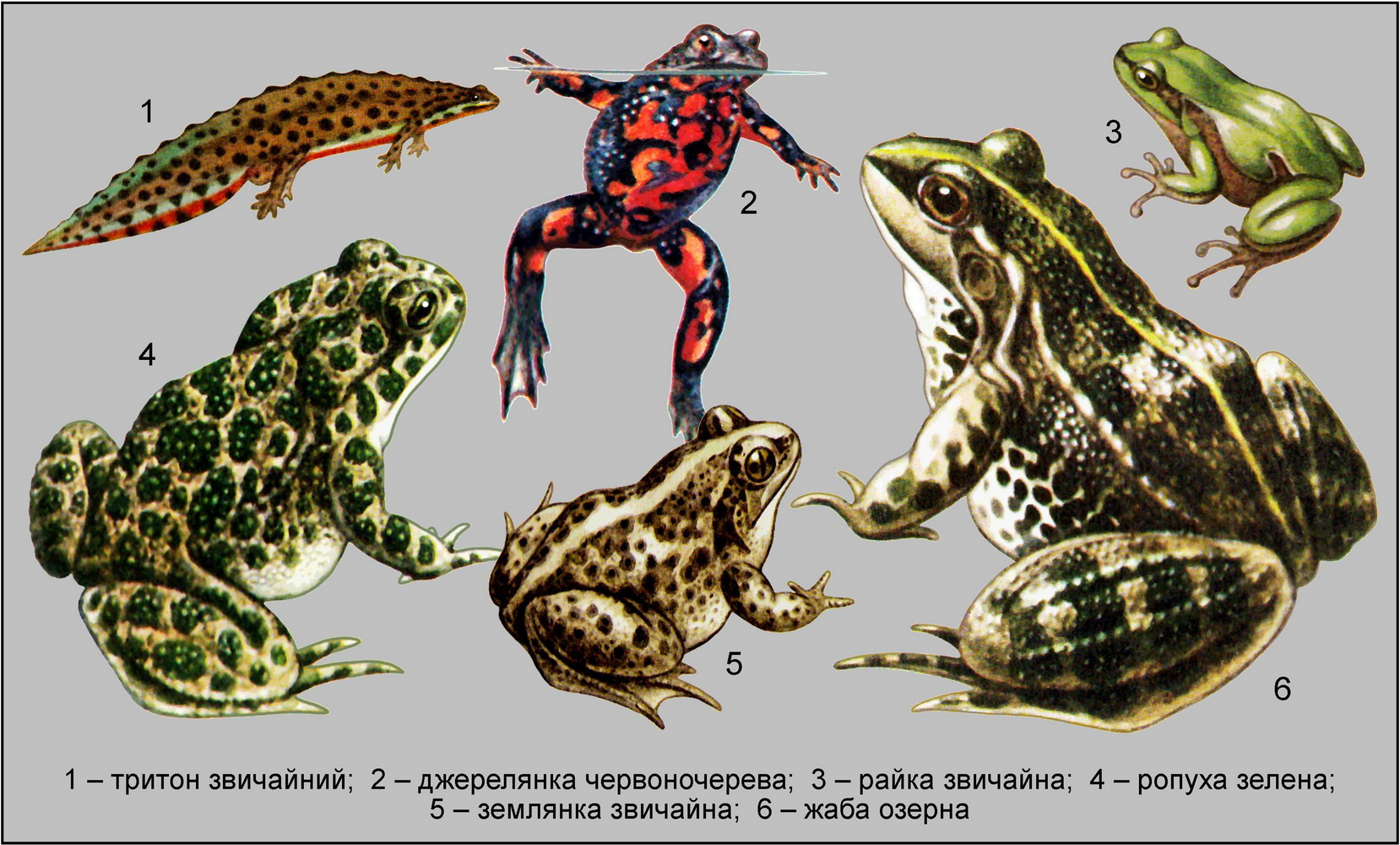 Земноводні острова Хортиця: 1 – тритон звичайний; 2 – джерелянка червоночерева; 3 – райка звичайна; 4 – ропуха зелена; 5 – землянка звичайна; 6 – жаба озерна. Ілюстрація (рисунок) до статті "Земноводні острова Хортиця" (Вікіпедія)